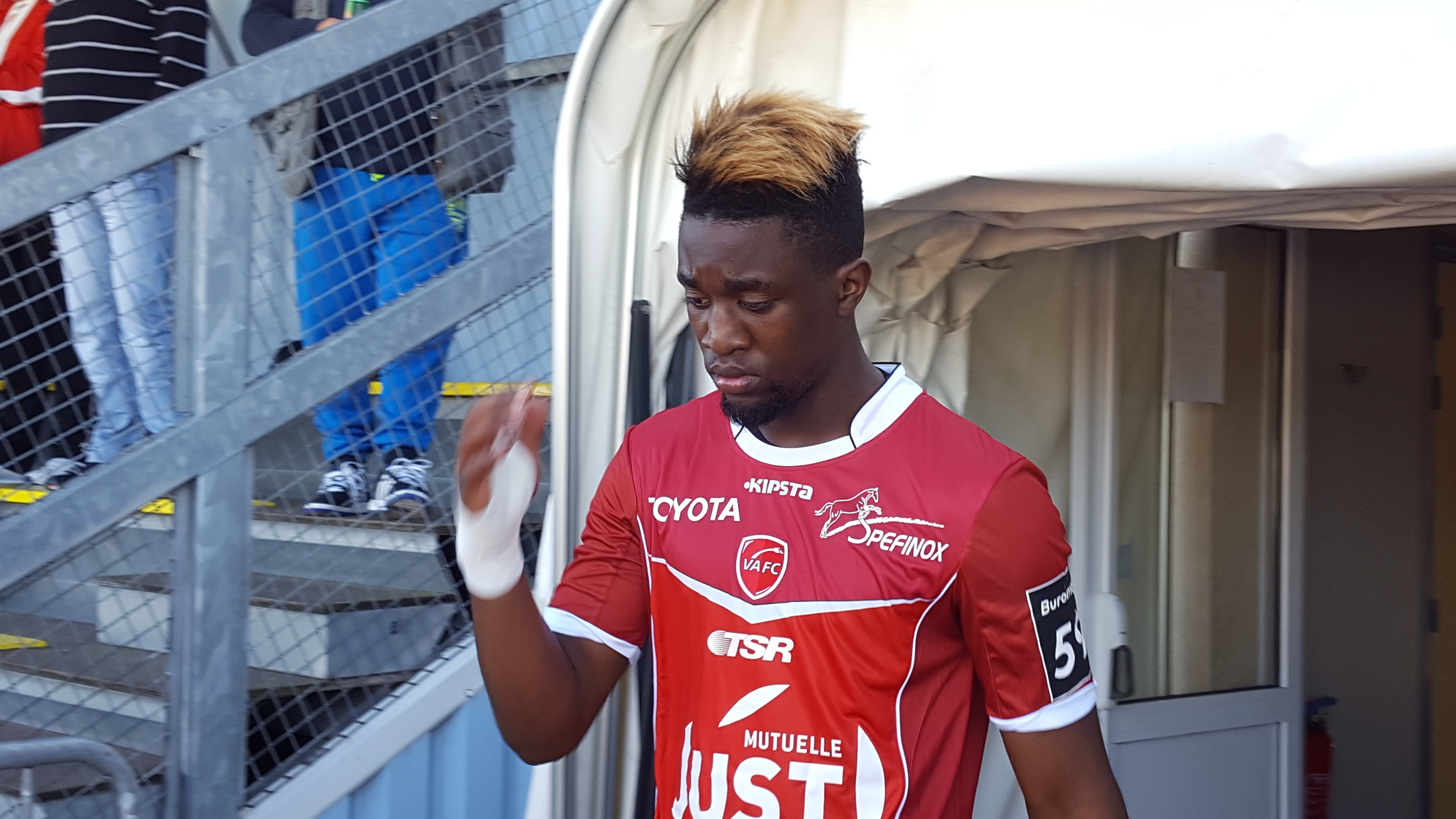 Isaac Mbenza lors du match amical Valenciennes / UNFP FC, le 2 juillet 2016, au Stade des Navarres à Aniche.